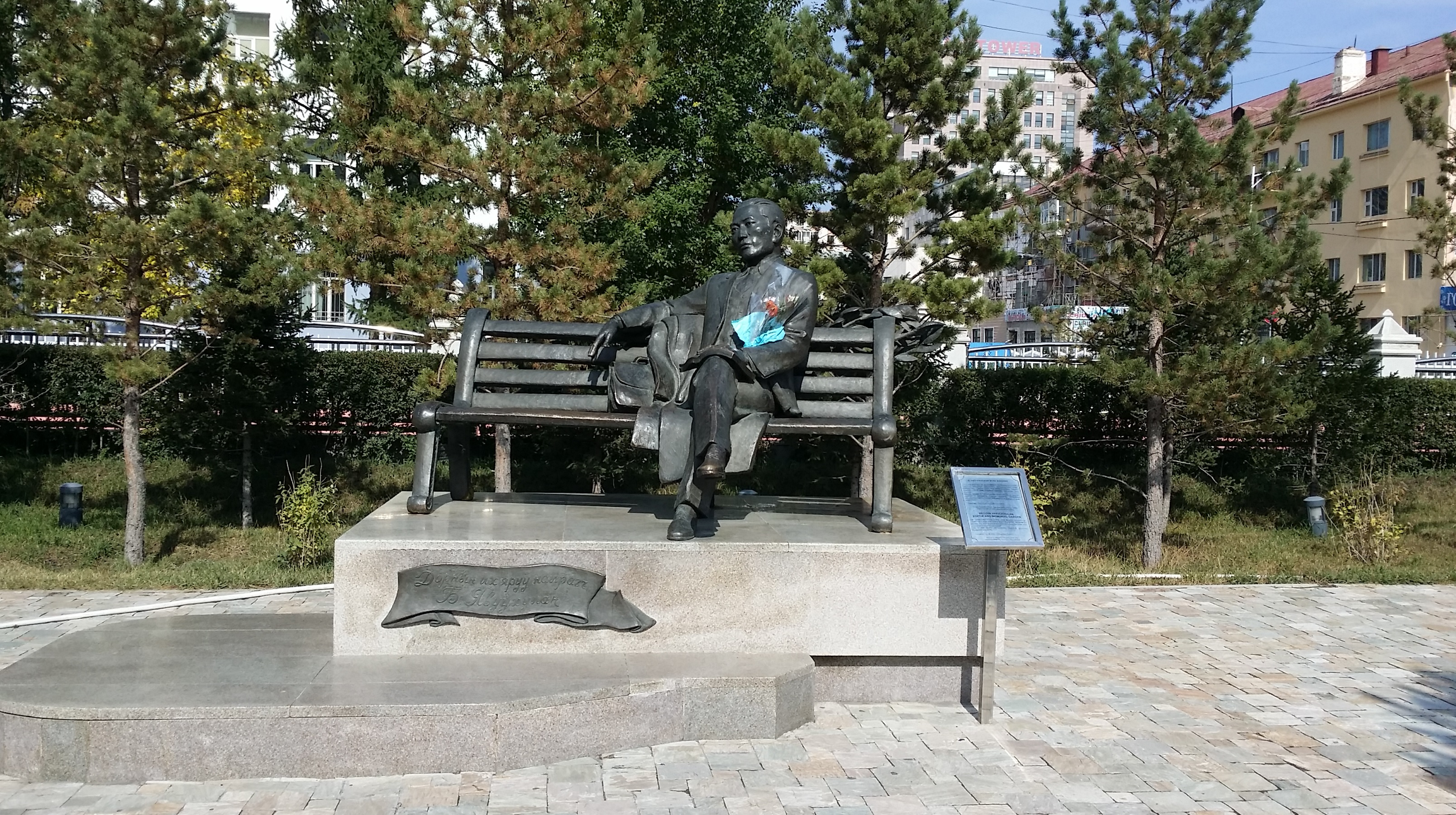 Монгол: Poet Begz Yavuuhulans monument in Mongolia, 2016-09-24.